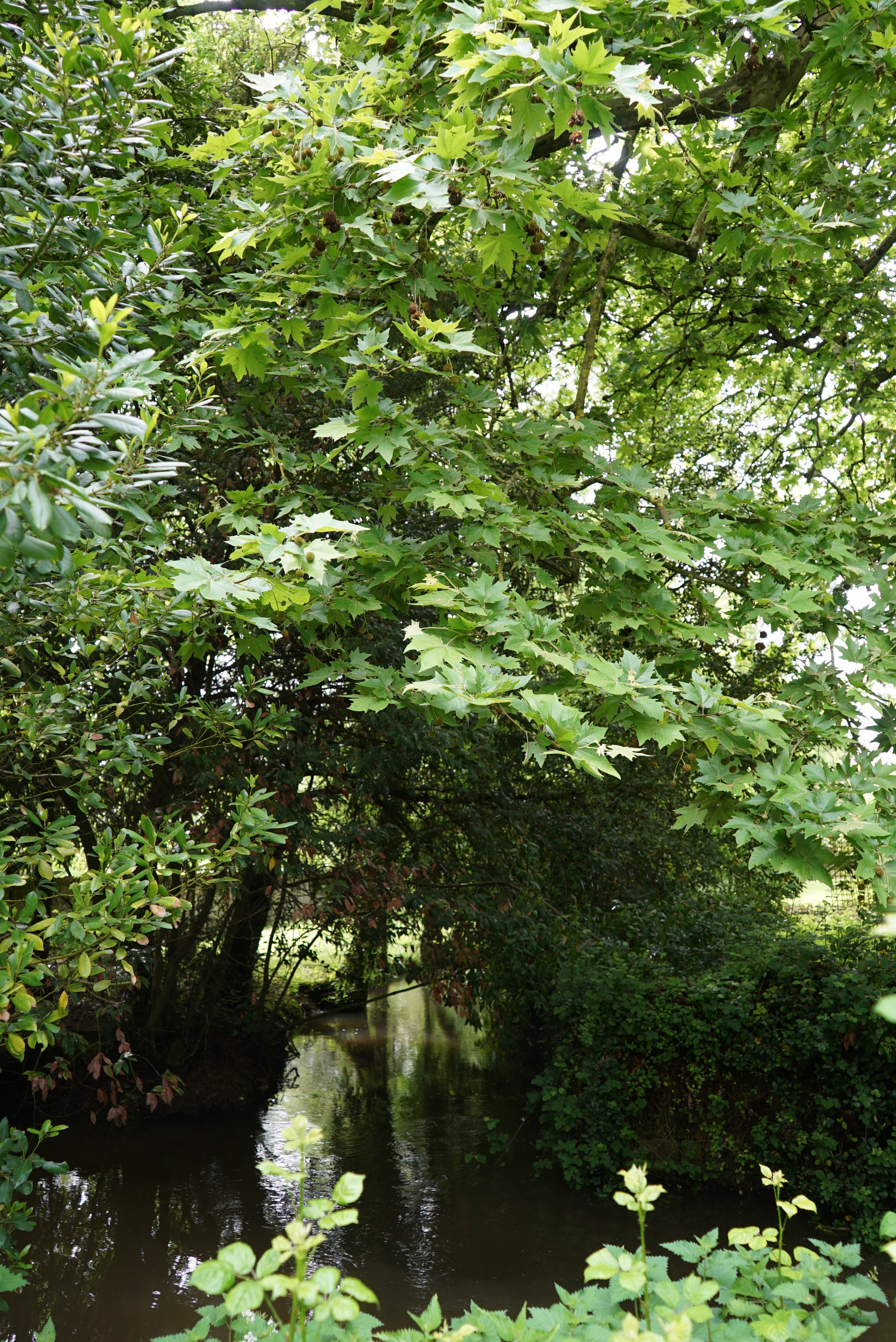 vue du ruisseau.